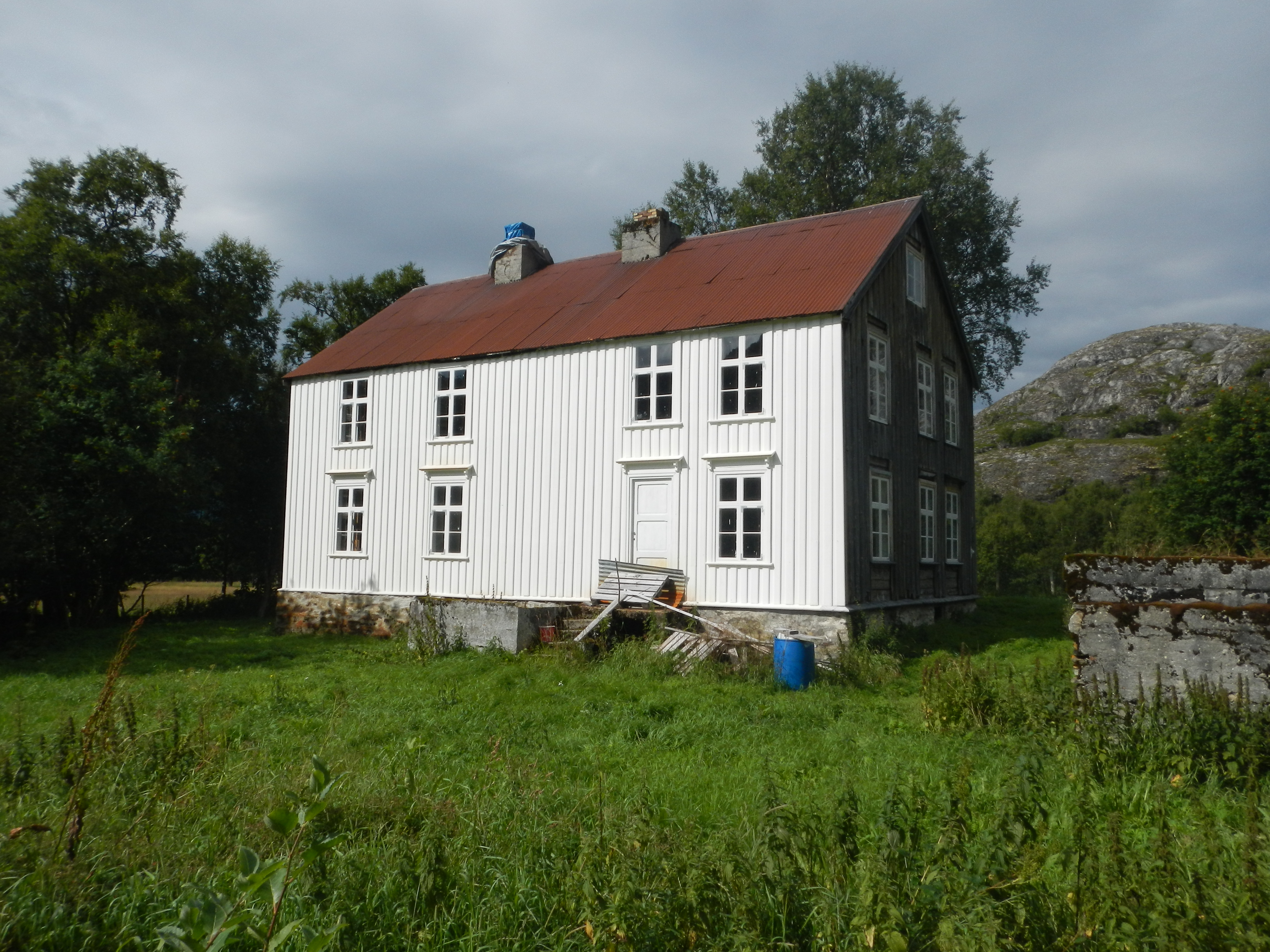 Hovedhuset på Storgården i 2013